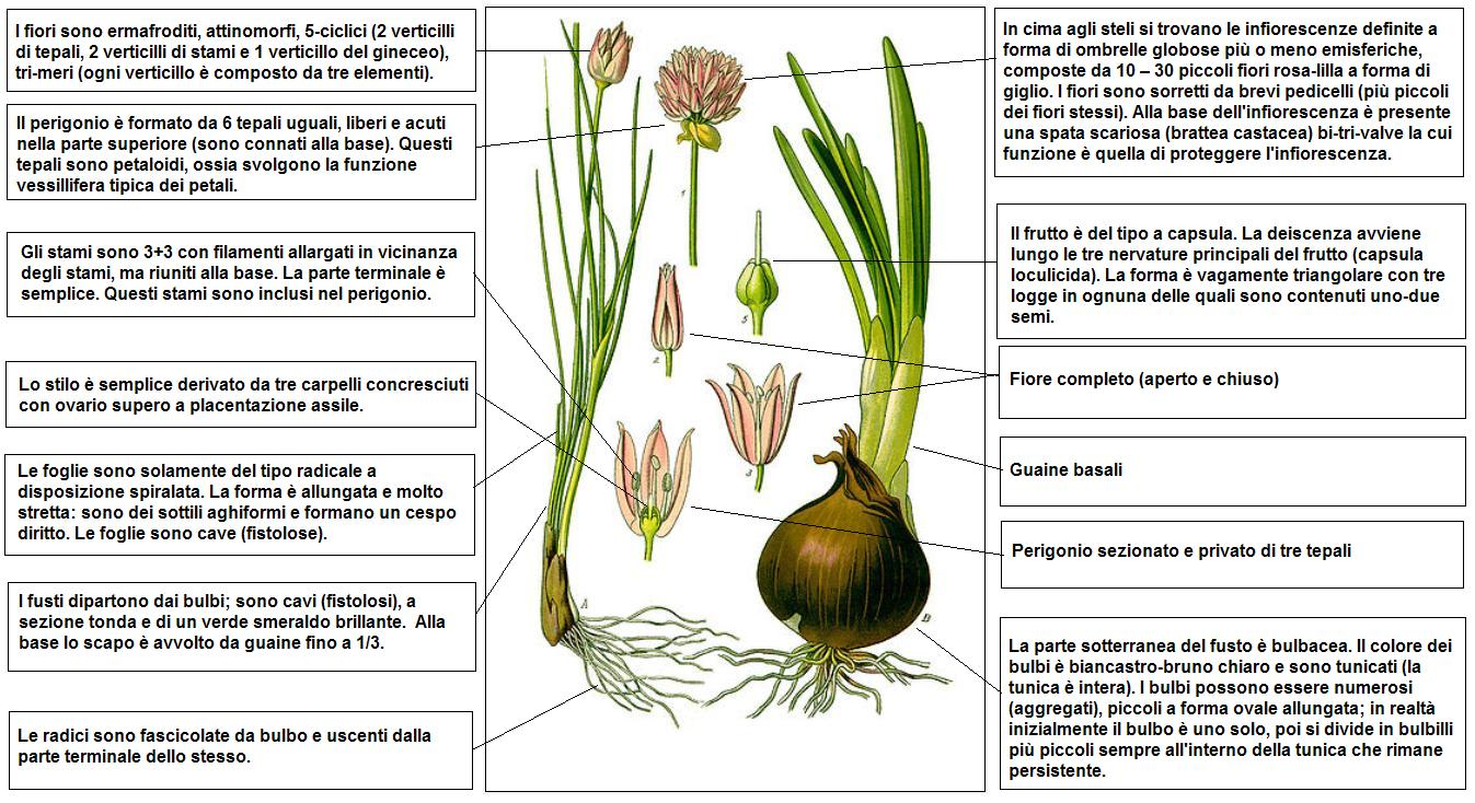 Allium schoenoprasum - Thome - DESC